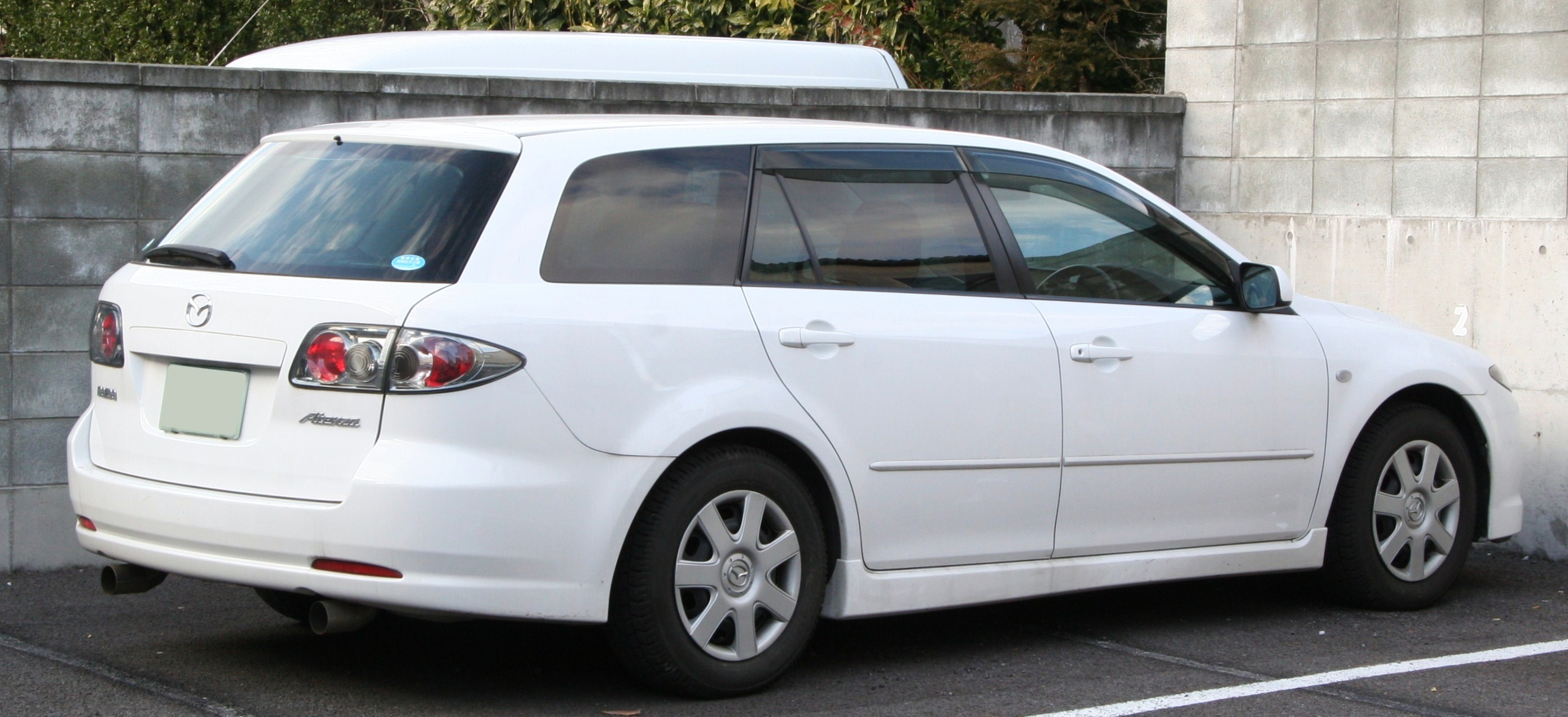 Mazda Atenza Sports Wagon